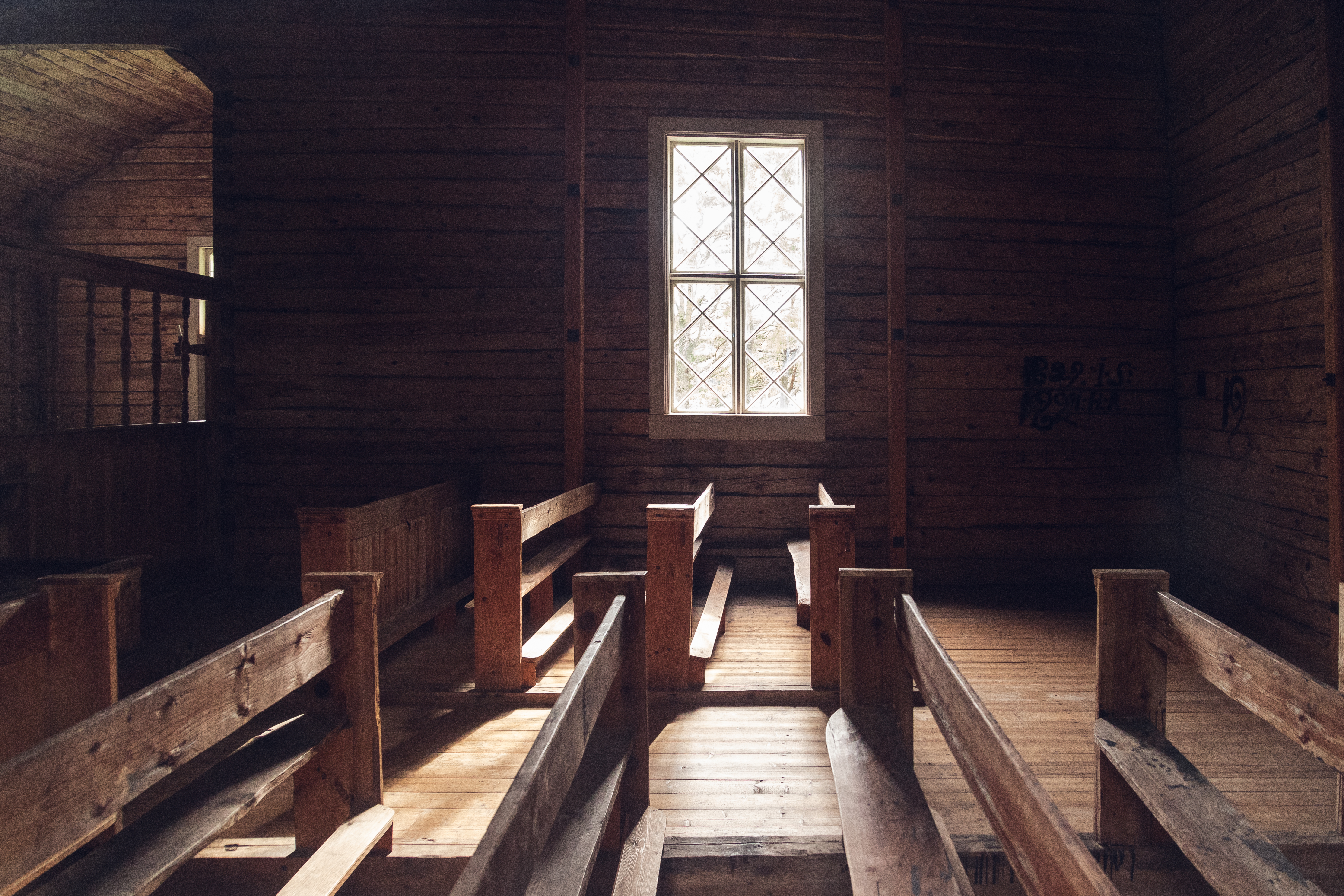 Själö Kyrka insidan Nagu